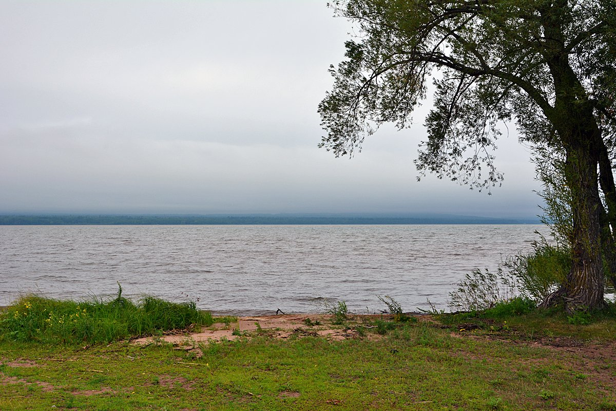 Chequamegon Bay bei Ashland, Wisconsin